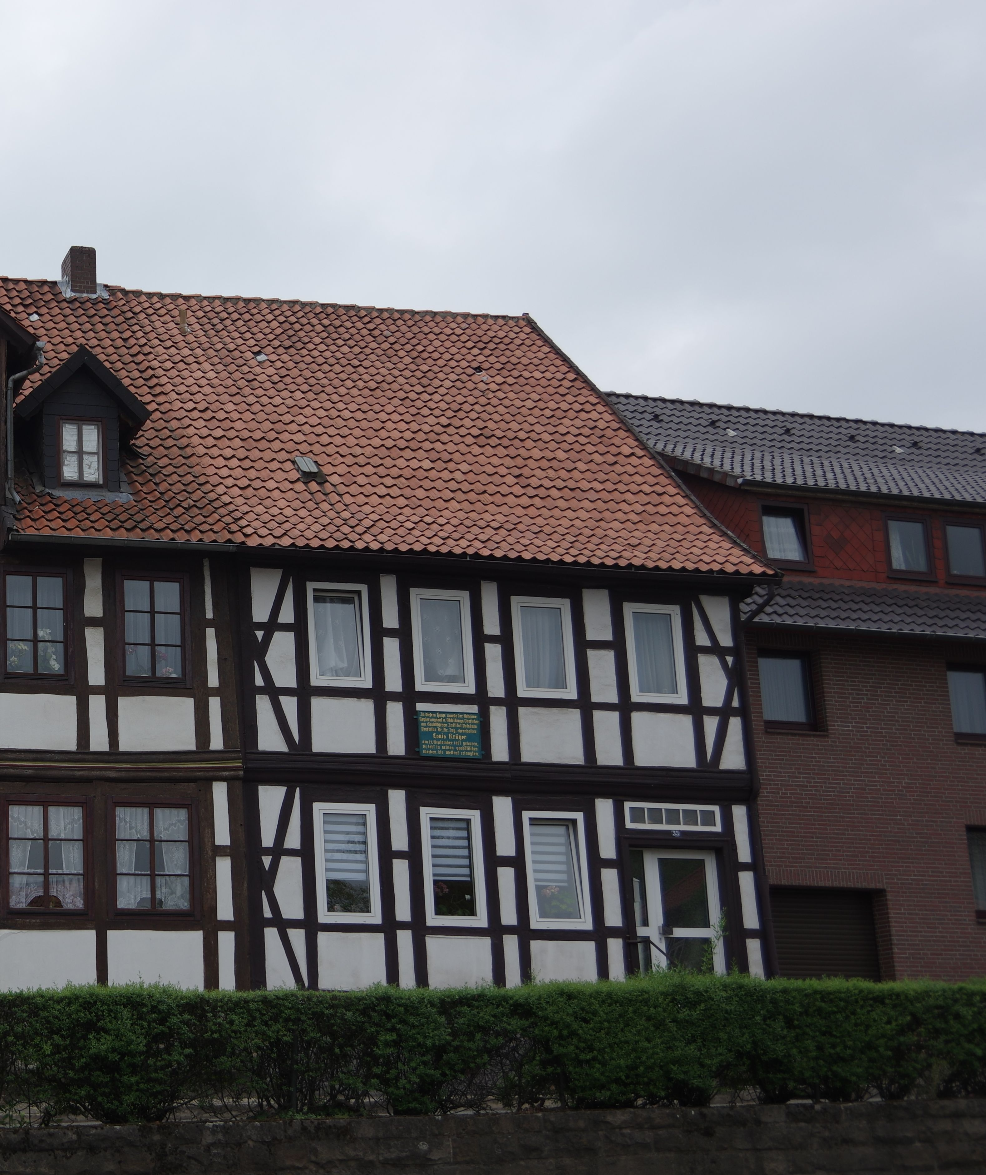 Elze in Niedersachsen. Das Wohnhaus von Louis Krüger, der hier in Elze geboren wurde und starb.